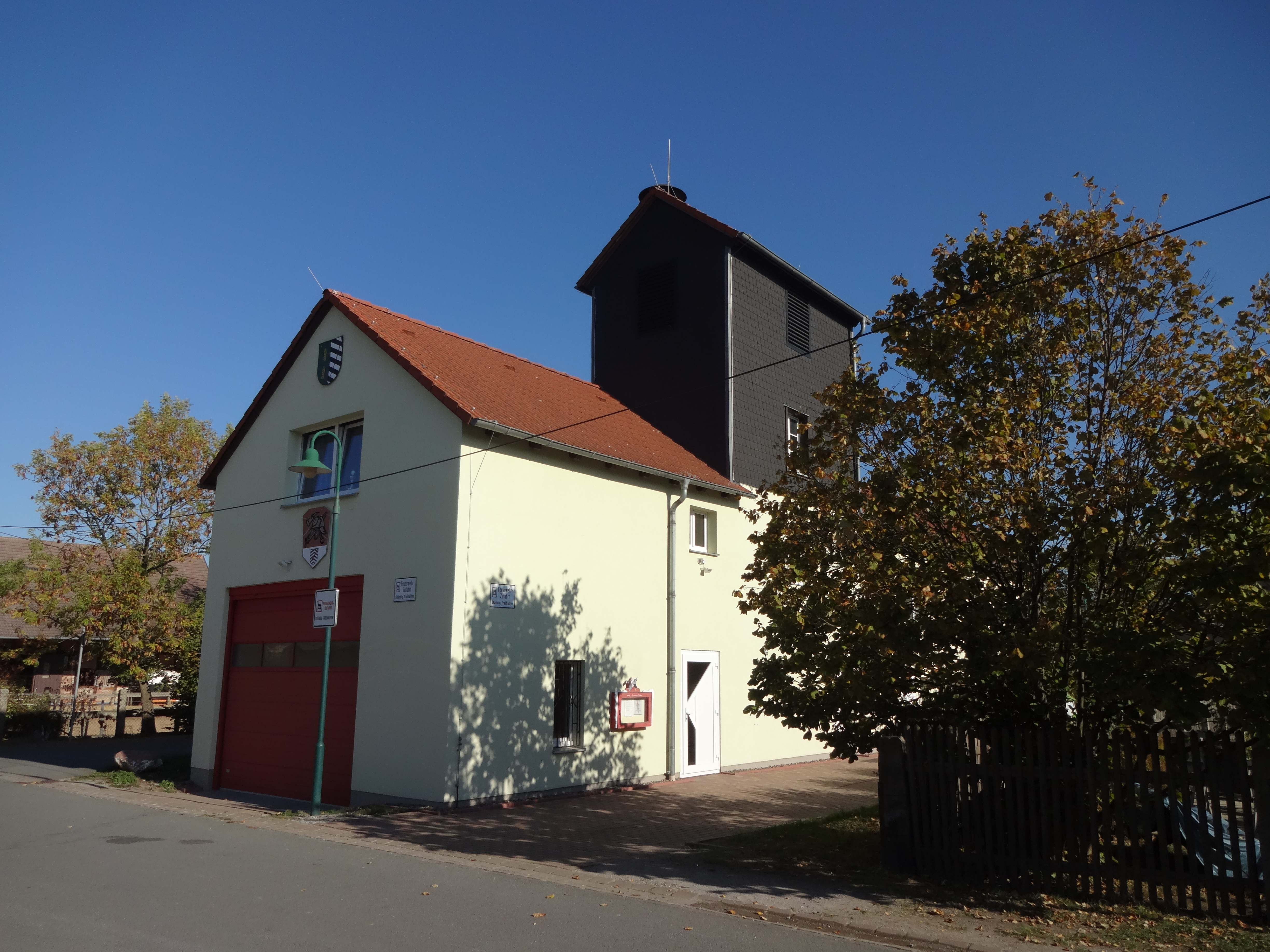 Freiwillige Feuerwehr in Schmatzfeld in der Gemeinde Nordharz (Sachsen-Anhalt)